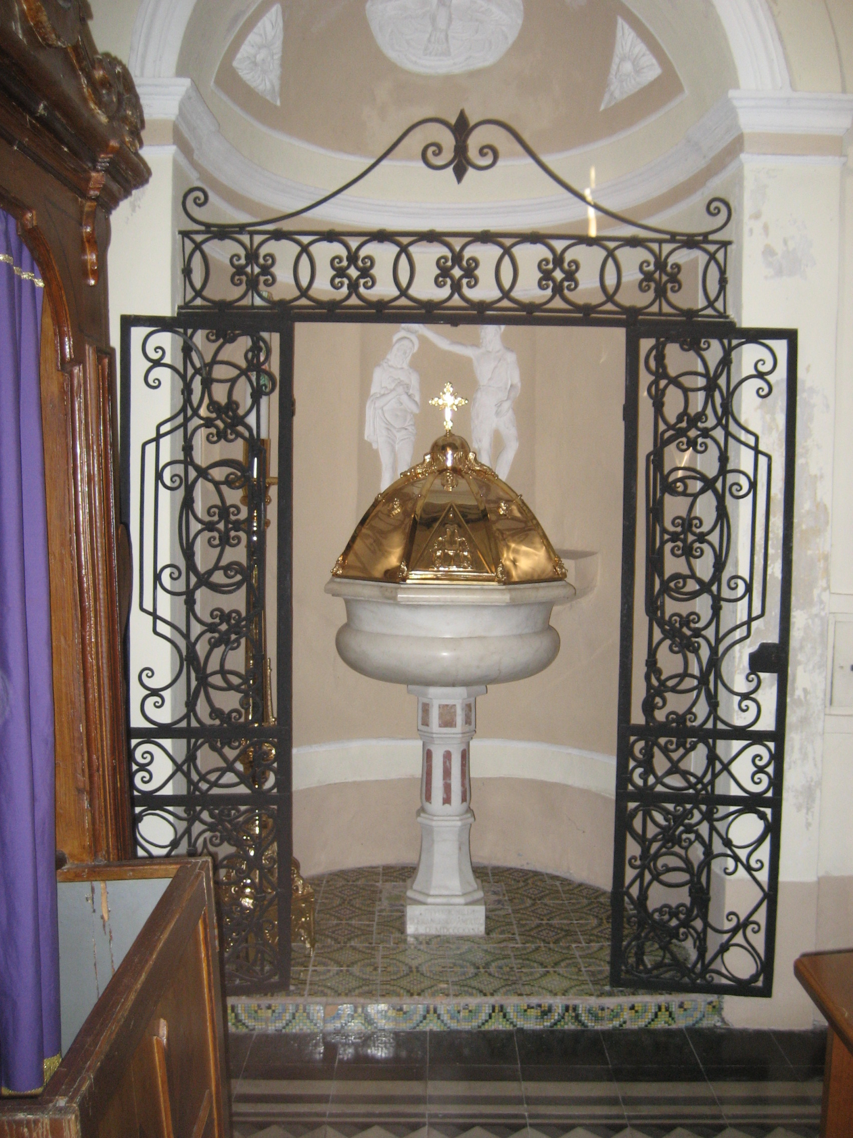 Chiesa di Sant'Antonio di Padova (Conca dei Marini): Fonte battesimale di stile barocco